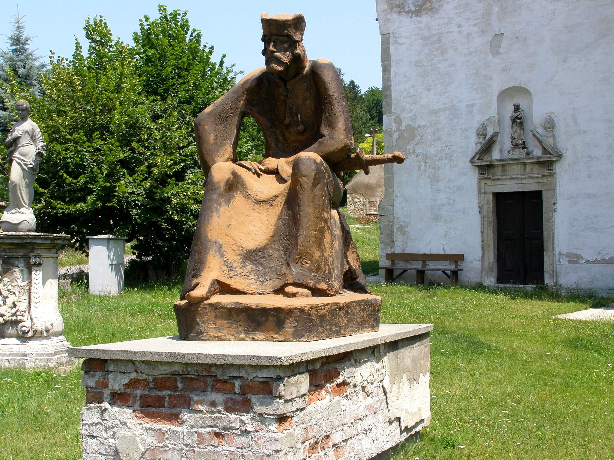 Socha Rastislava v záhrade kostola